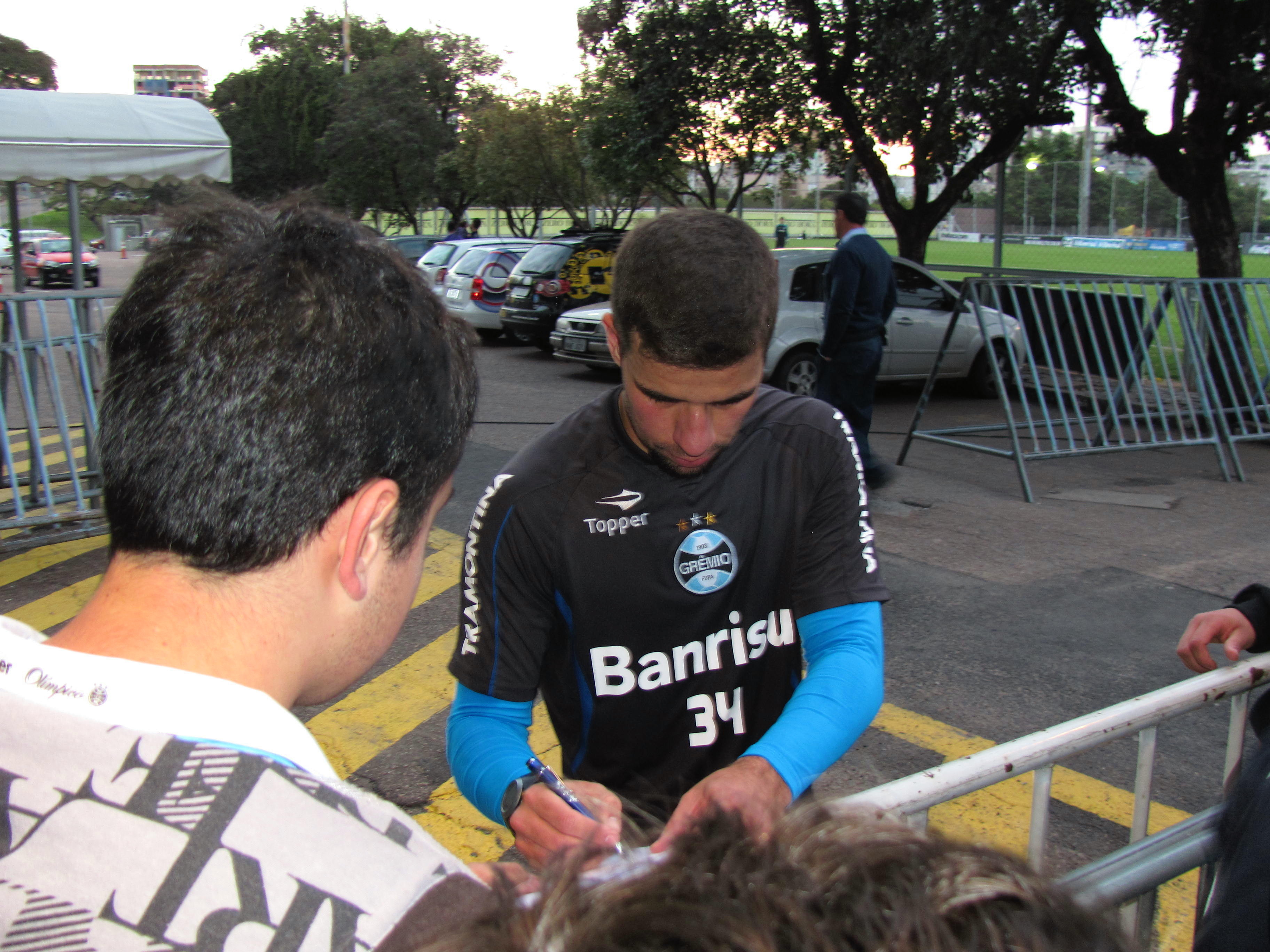 André Lima dando autógrafos no estádio Olímpico.